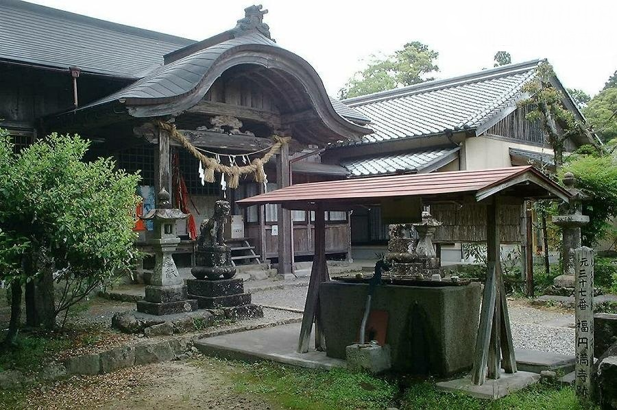 高岡神社の境内に、元３７番福円満寺跡の表示がある